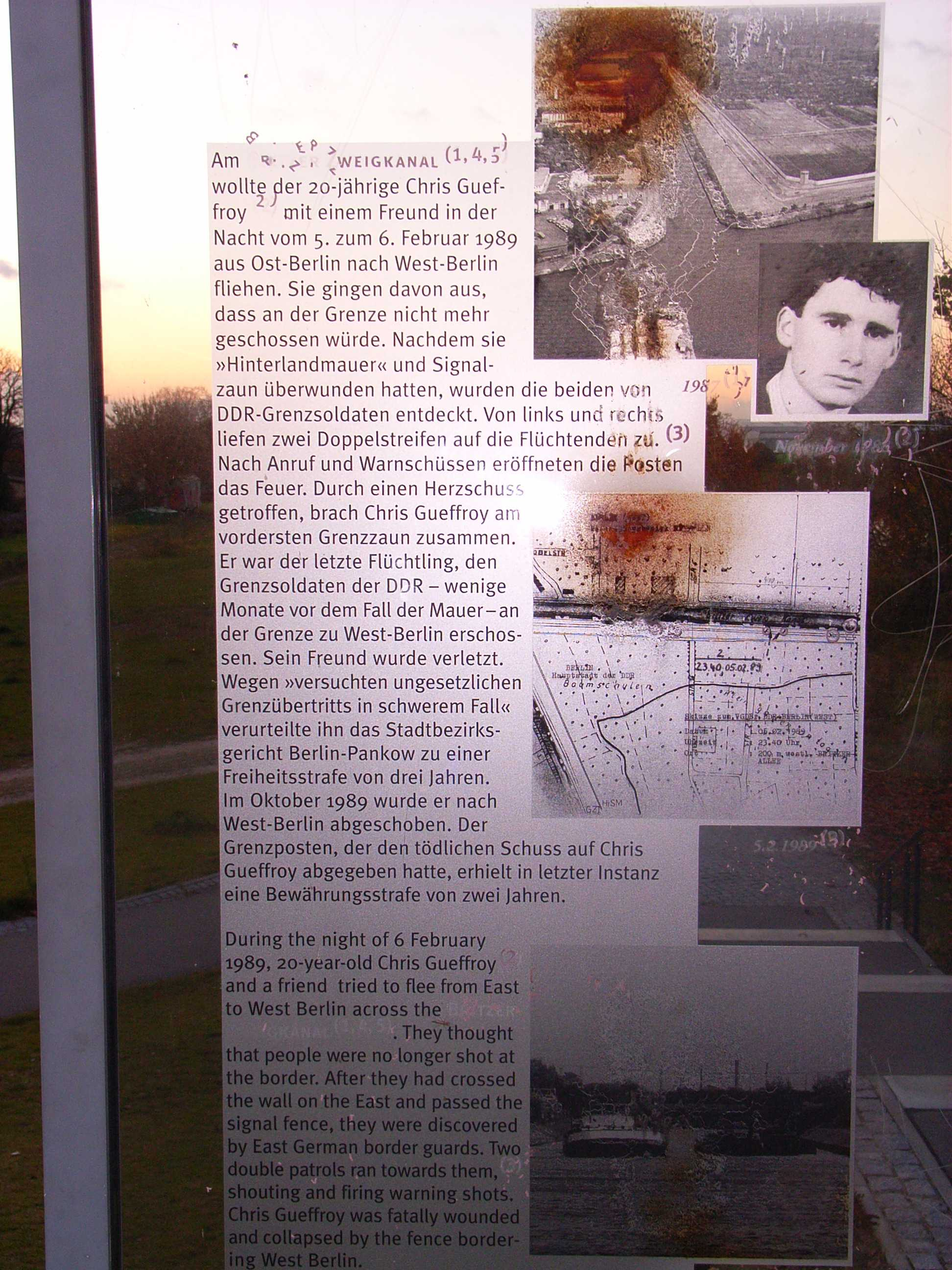 beschädigte Gedenktafel für den letzten Mauertoten Chris Gueffroy an der Chris-Gueffroy-Allee